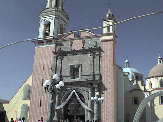 Parroquia de Santa Maria de la Asunción